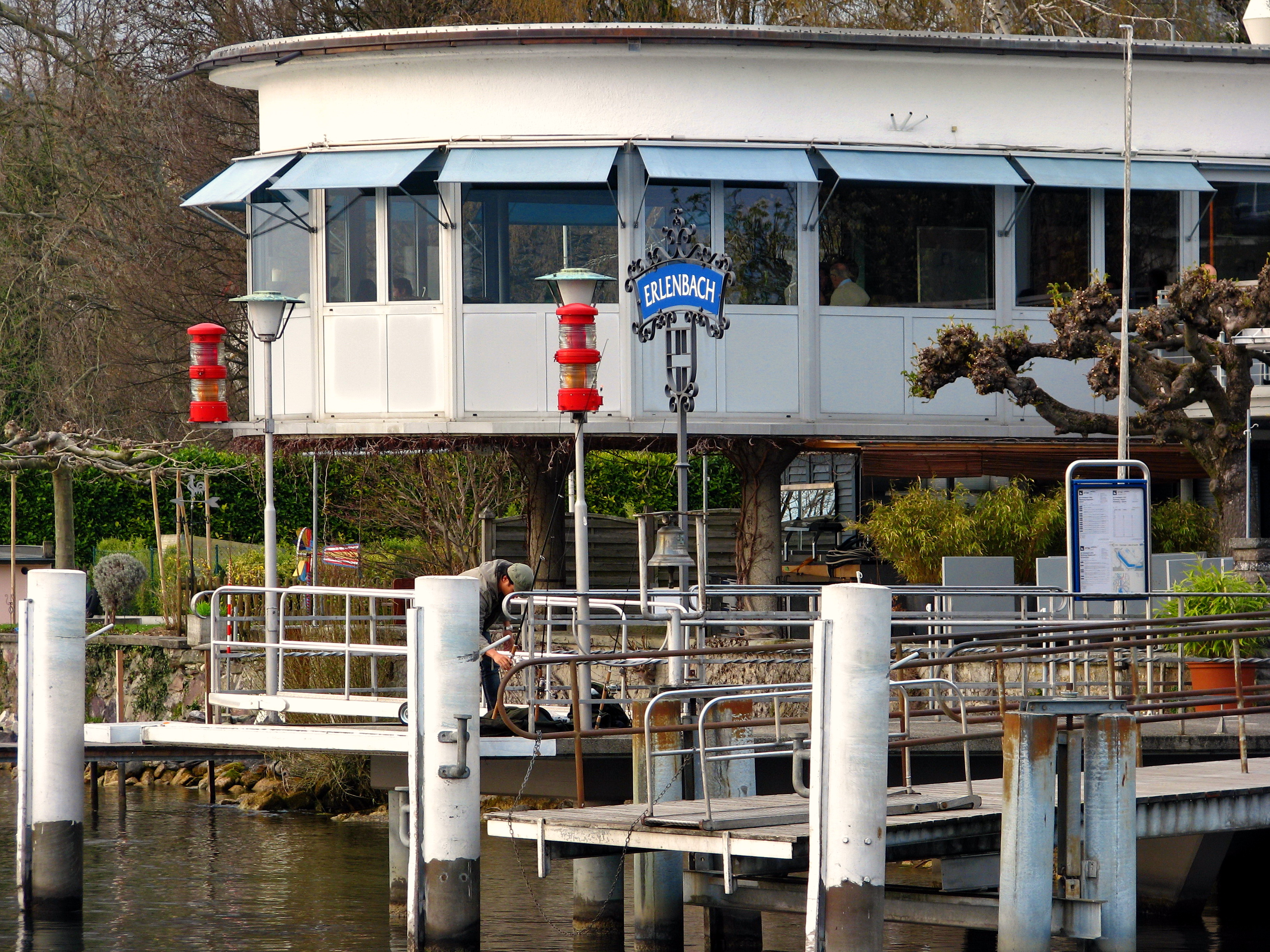 Restaurant Schönau in Erlenbach (Switzerland) as seen from ZSG motorship Uetliberg.